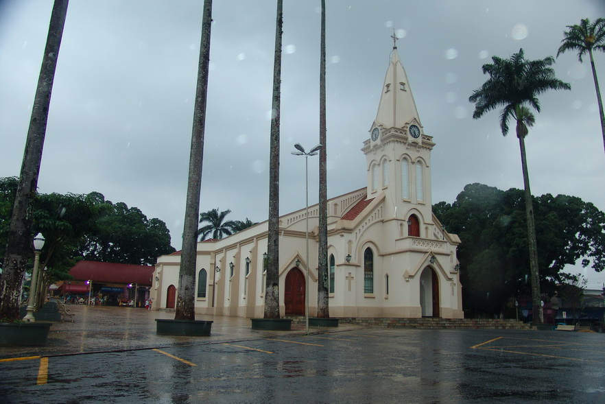 Imagem do município de São Pedro, estado de São Paulo, Brasil.